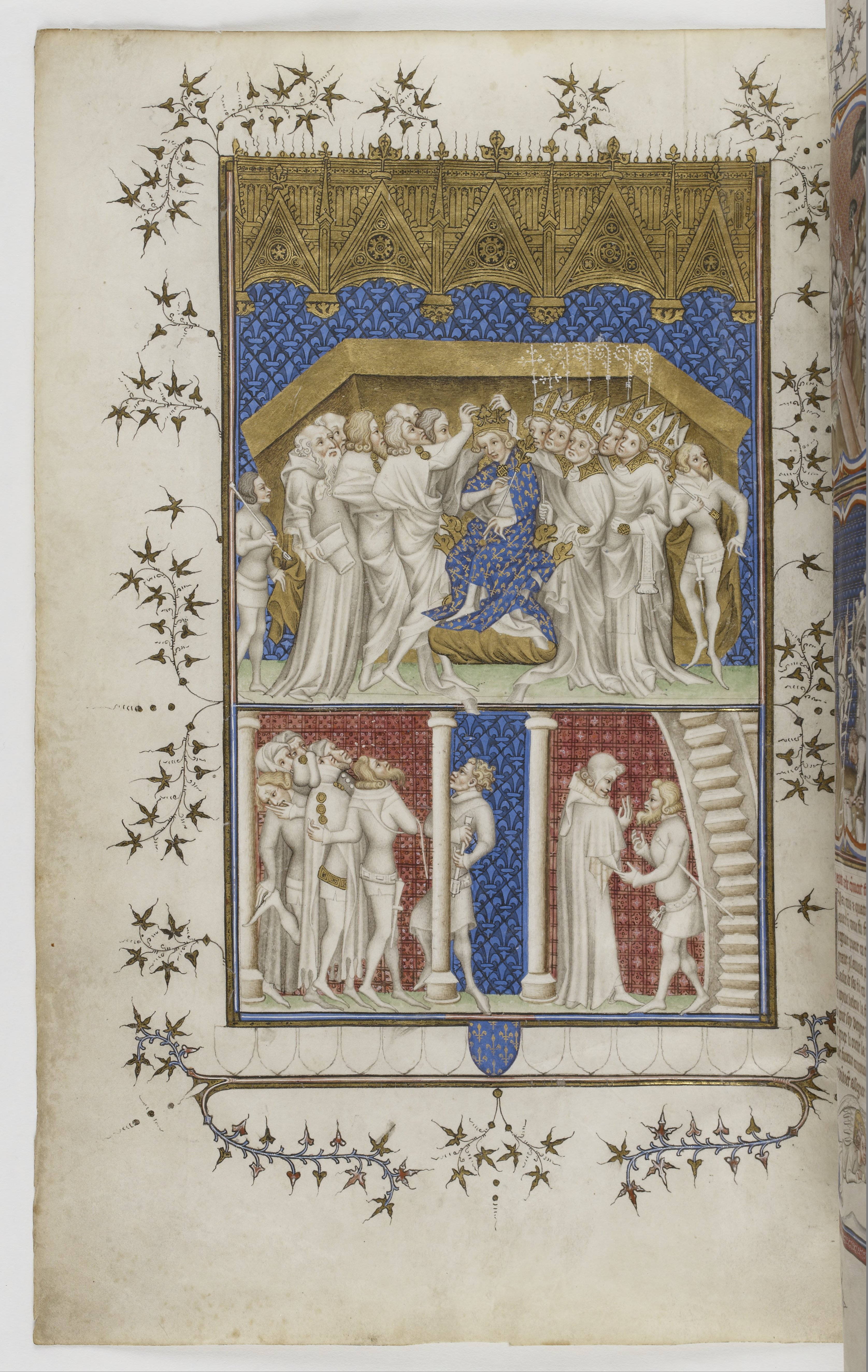 « Le couronnement de Charles VI à Reims » (1380) « Grandes Chroniques de France de Charles V», Enluminure, (XIVe siècle)